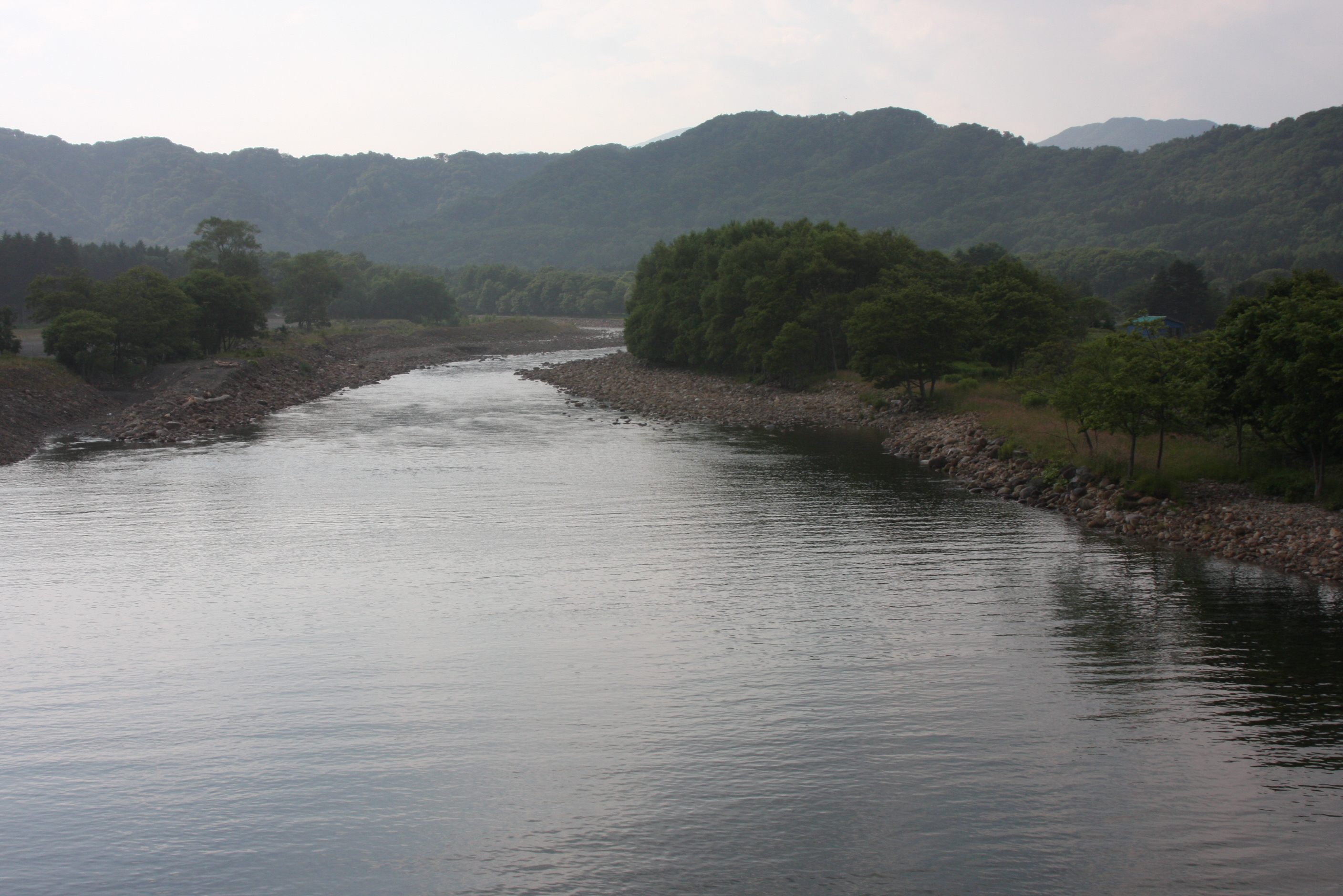 猿留川（えりも町目黒） 猿留橋より上流を望む